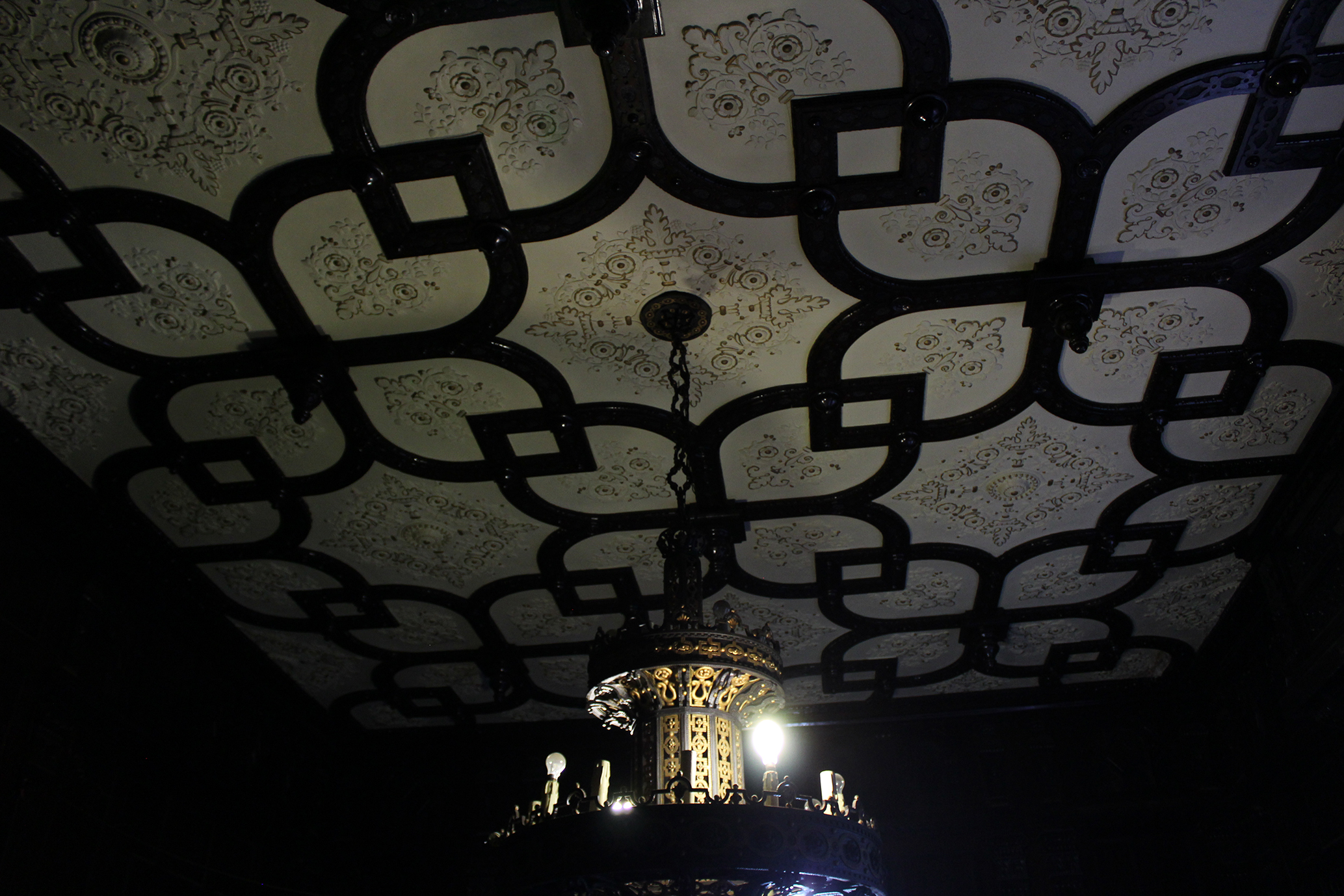 Lustre e detalhe do teto do hall de entrada da Casa de Nhonhô Magalhães, localizada no bairro de Higienópolis, em São Paulo, Brasil. A Casa de Nhonhô Magalhães é um patrimônio histórico localizado na Avenida Higienópolis, no bairro de Higienópolis, em São Paulo, Brasil. O casarão pertenceu ao barão do café Carlos Leôncio Magalhães, que encomendou o projeto em 1927, pela construtora Siciliano & Silva. As obras foram concluídas em 1939 e o estilo eclético da casa foi inspirado nos palacetes franceses do século XIX.